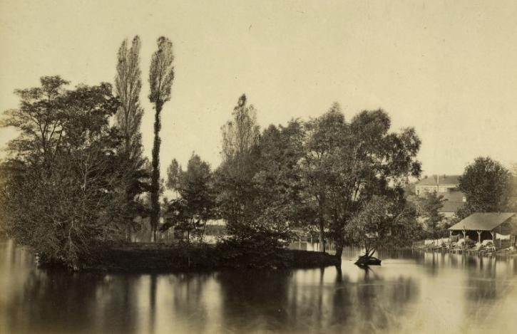 Ancienne vue à partir du Gué de Maulny au Mans: les Bouches-de-l'Huisne. Description photogravure de la fin du XIXème siècle du Gué-de-Maulny au MansDate between 1890 and 1895 date QS:P,+1890-00-00T00:00:00Z/8,P1319,+1890-00-00T00:00:00Z/9,P1326,+1895-00-00T00:00:00Z/9Source Collection de la médiathèque Louis AragonAuthor Commande de la ville du MansPermission(Reusing this file) PD Old photogravure de la fin du XIXème siècle du Gué-de-Maulny au Mans